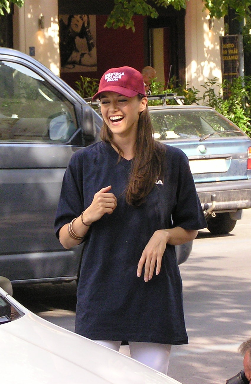 Supermodel - Iva Kubelková - from Czech Republic.